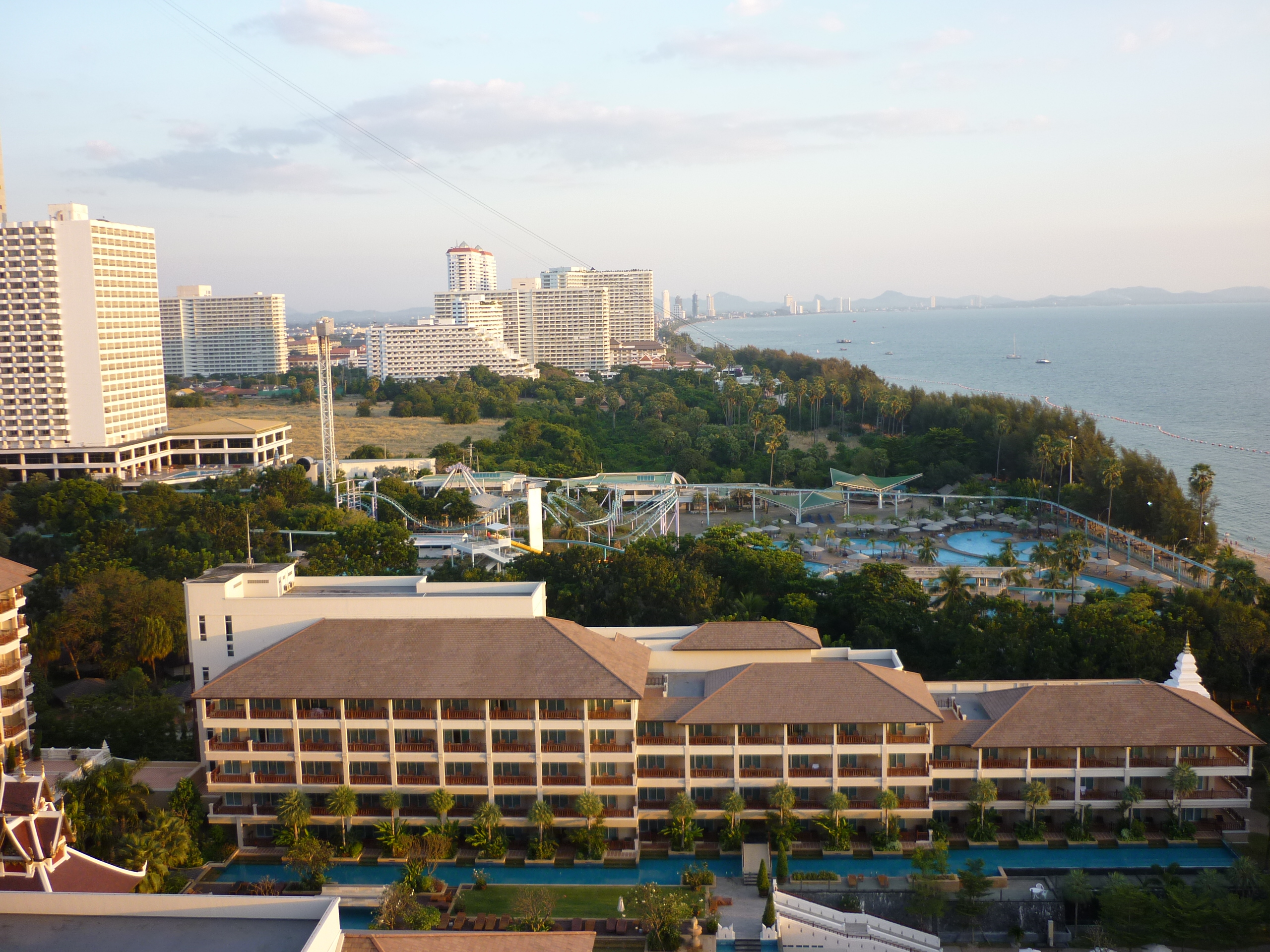 Крайбрежие Патая - Джомтиен